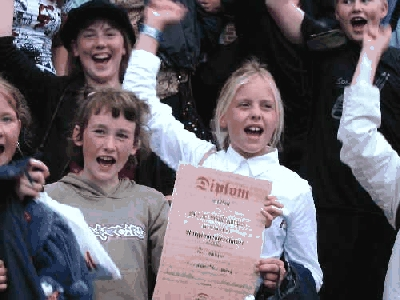 Sveio Skulekorps - Siger i NM 2003